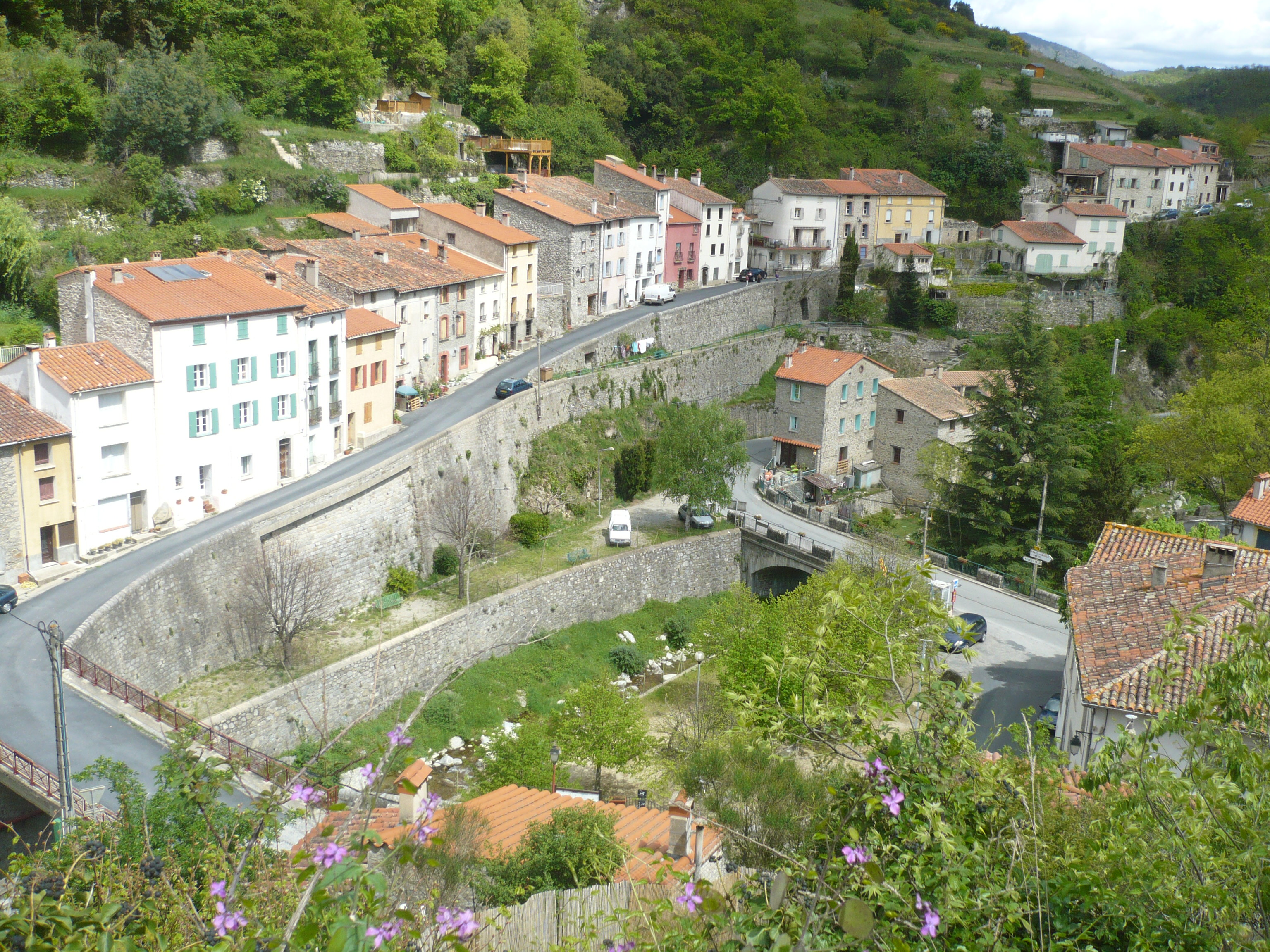 Vue d'ensemble du Tech